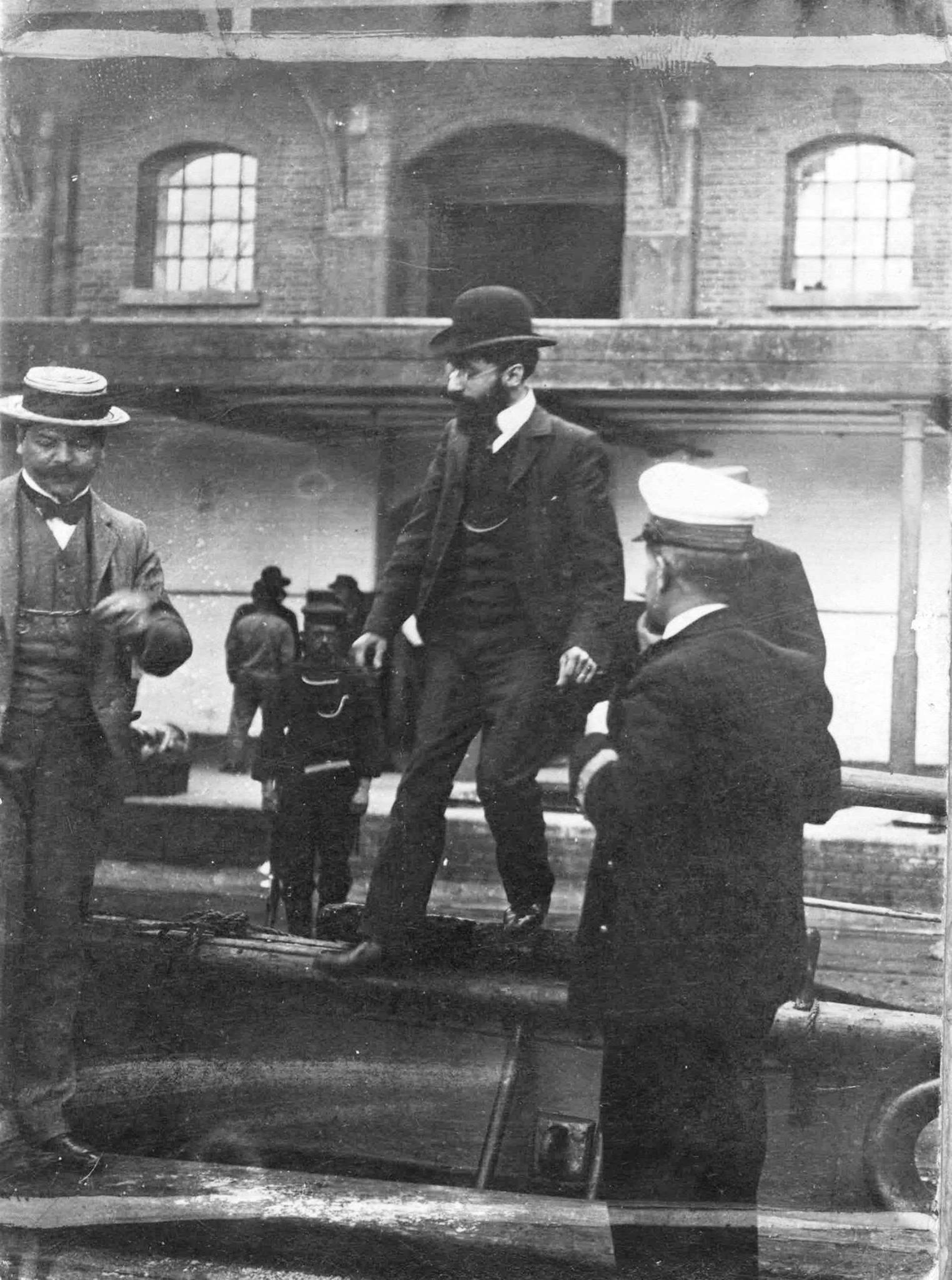 Huelga General de noviembre de 1902 en Buenos Aires. Santiago Locazi, uno de los principales instigadores, siendo deportado a Italia a bordo del Luca Di Galiera gracias a la ley de Residencia sancionada ese mismo mes.